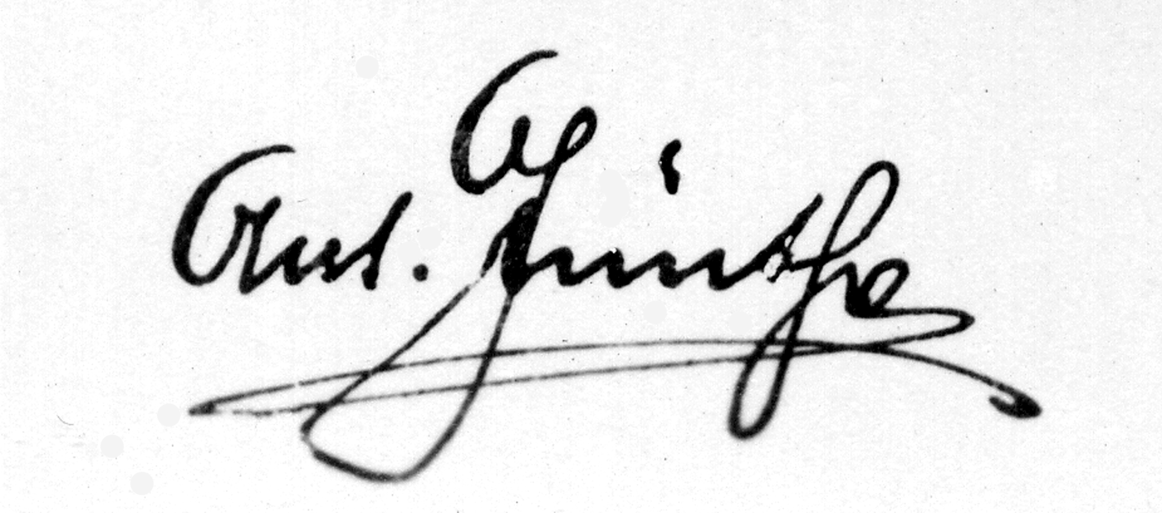 Autogramm von Anton Günther